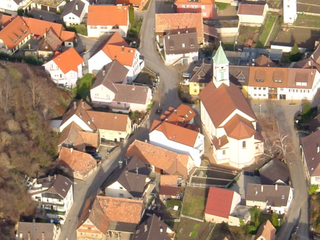 Luftbild von Schelingen aufgenommen bei einer Ballonfahrt